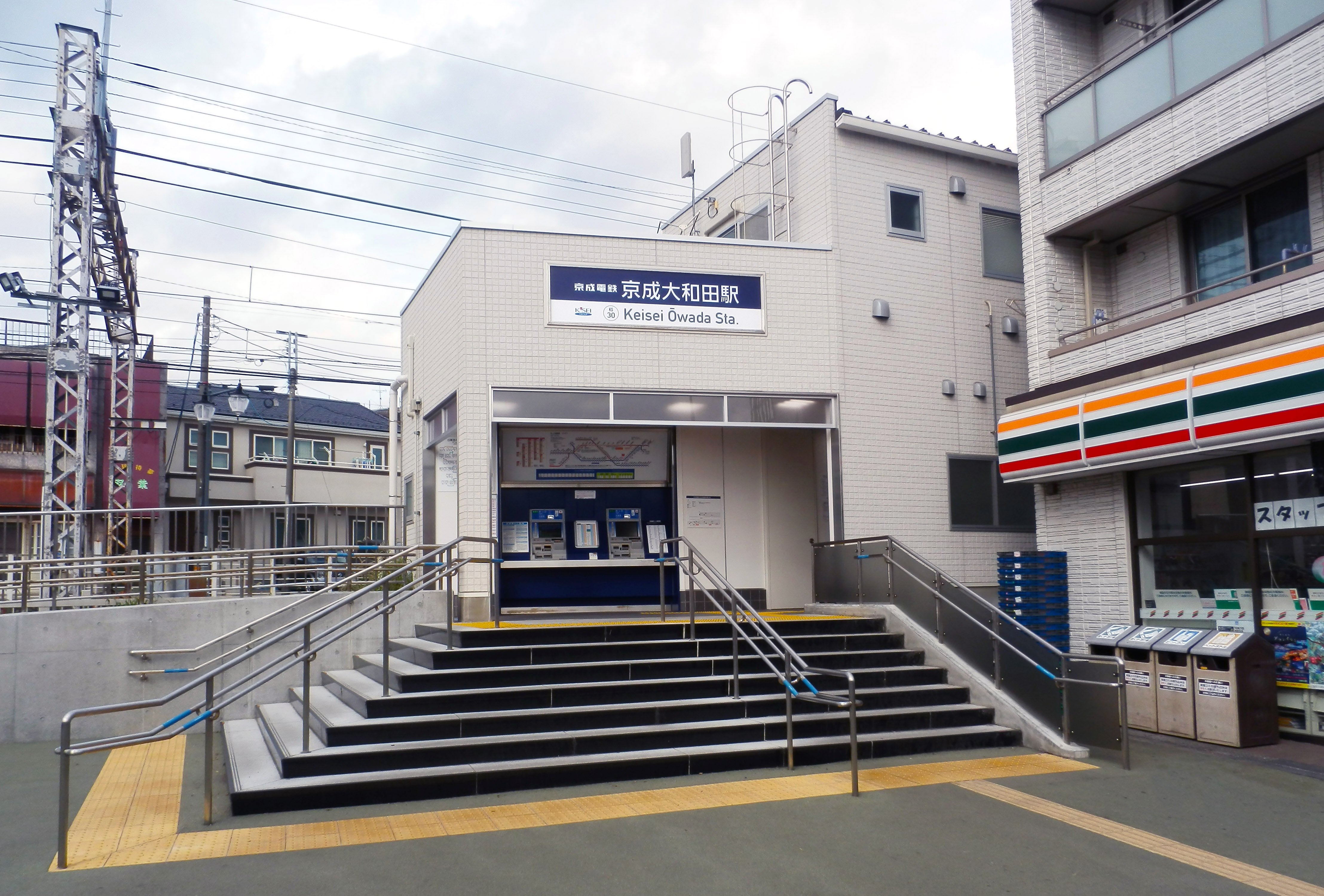 京成大和田駅南改札口